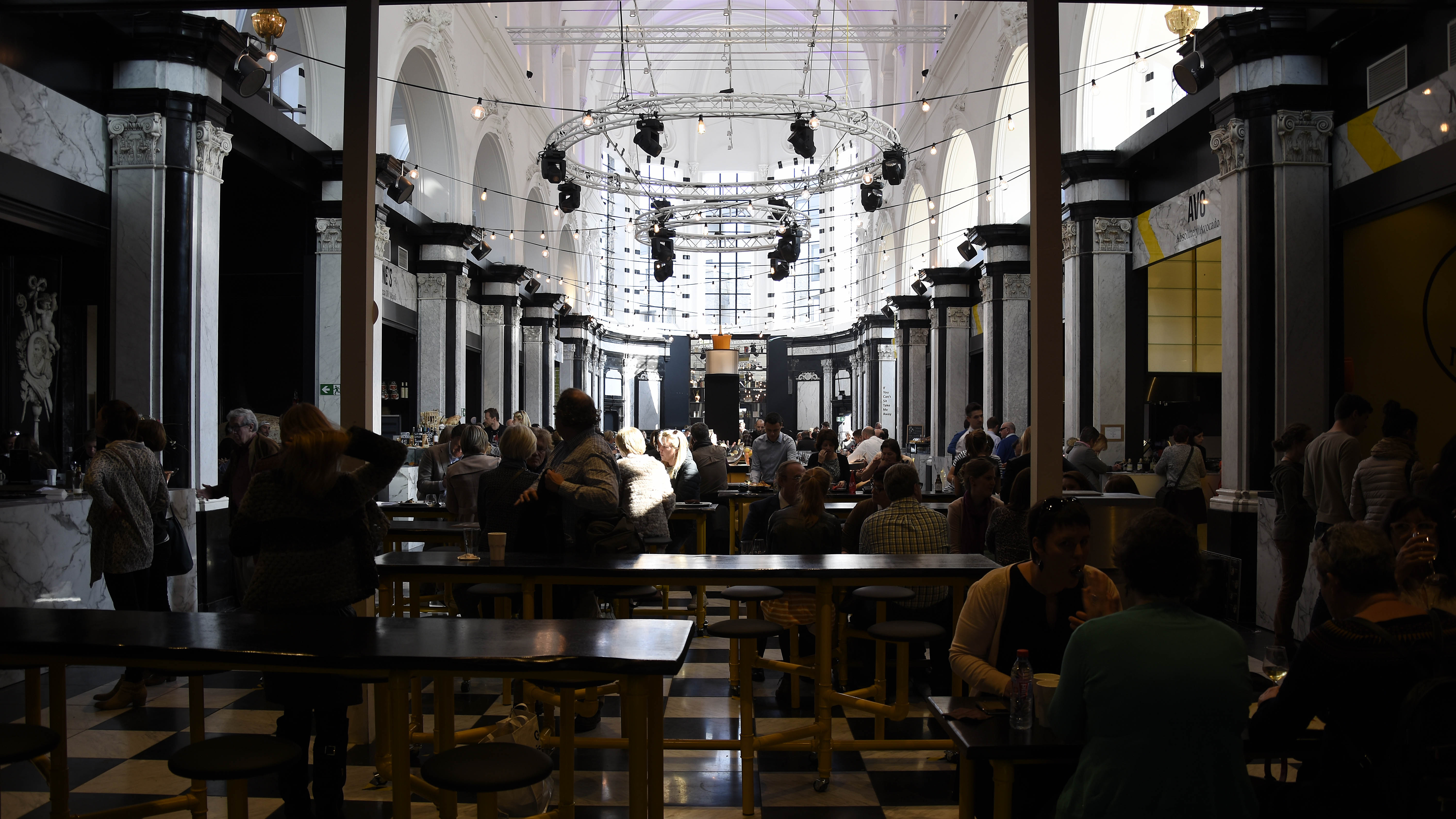 Gent Baudelokapel holy food market 16-03-2017 13-03-49